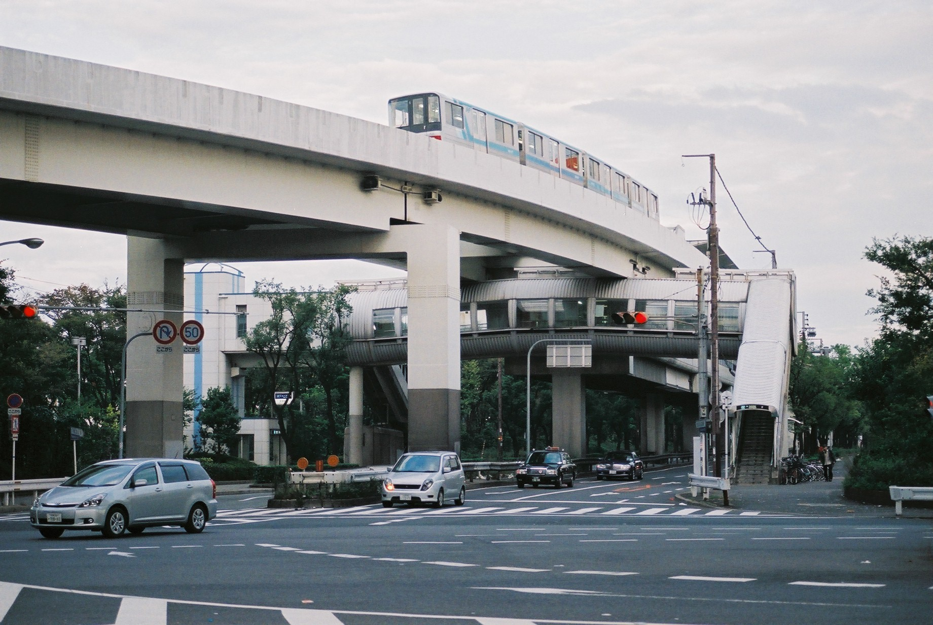 撮影者: のねをつほ 撮影日: 平成19年11月5日 撮影場所: 大阪府大阪市住之江区南港南二丁目、東北東を望む 住之江通、南港東2交差点 一部塗り消し